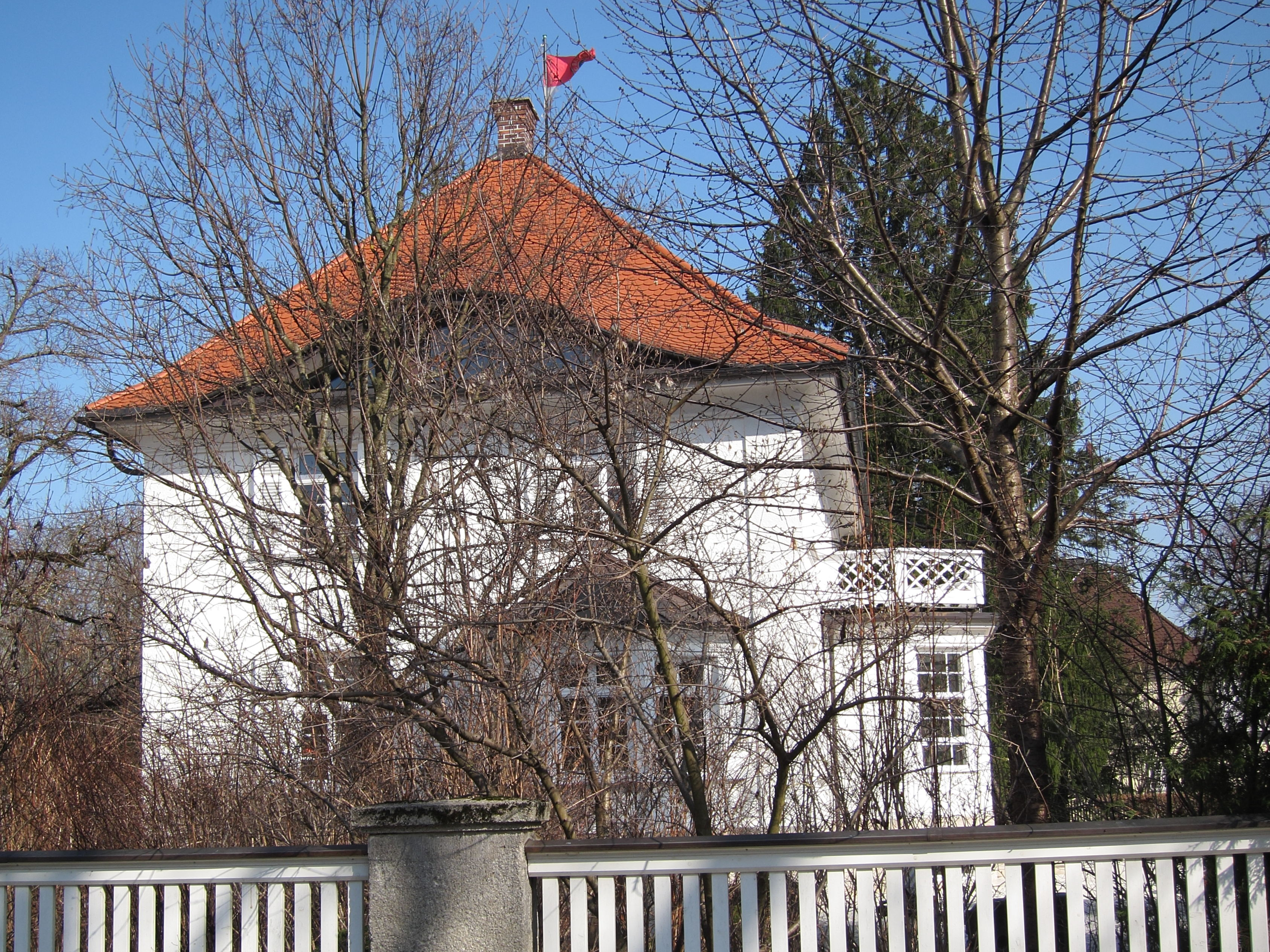 Floßmannstraße 8; Villa, barockisierend, 1925 von Feye Peins.